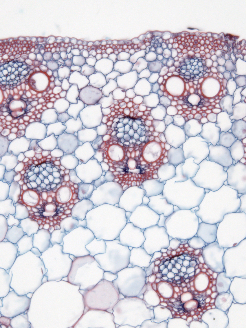 Ausschnitt aus einem Sprossquerschnitt durch Zea mays mit im Sprossparenchym verstreut liegenden geschlossen kollateralen Leitbündel. Paraffinschnitt mit Färbung durch Astrablau und Safranin. Zur Bezeichnung einzelner Elemente den Mauszeiger über das Bild bewegen (Notizfunktion).